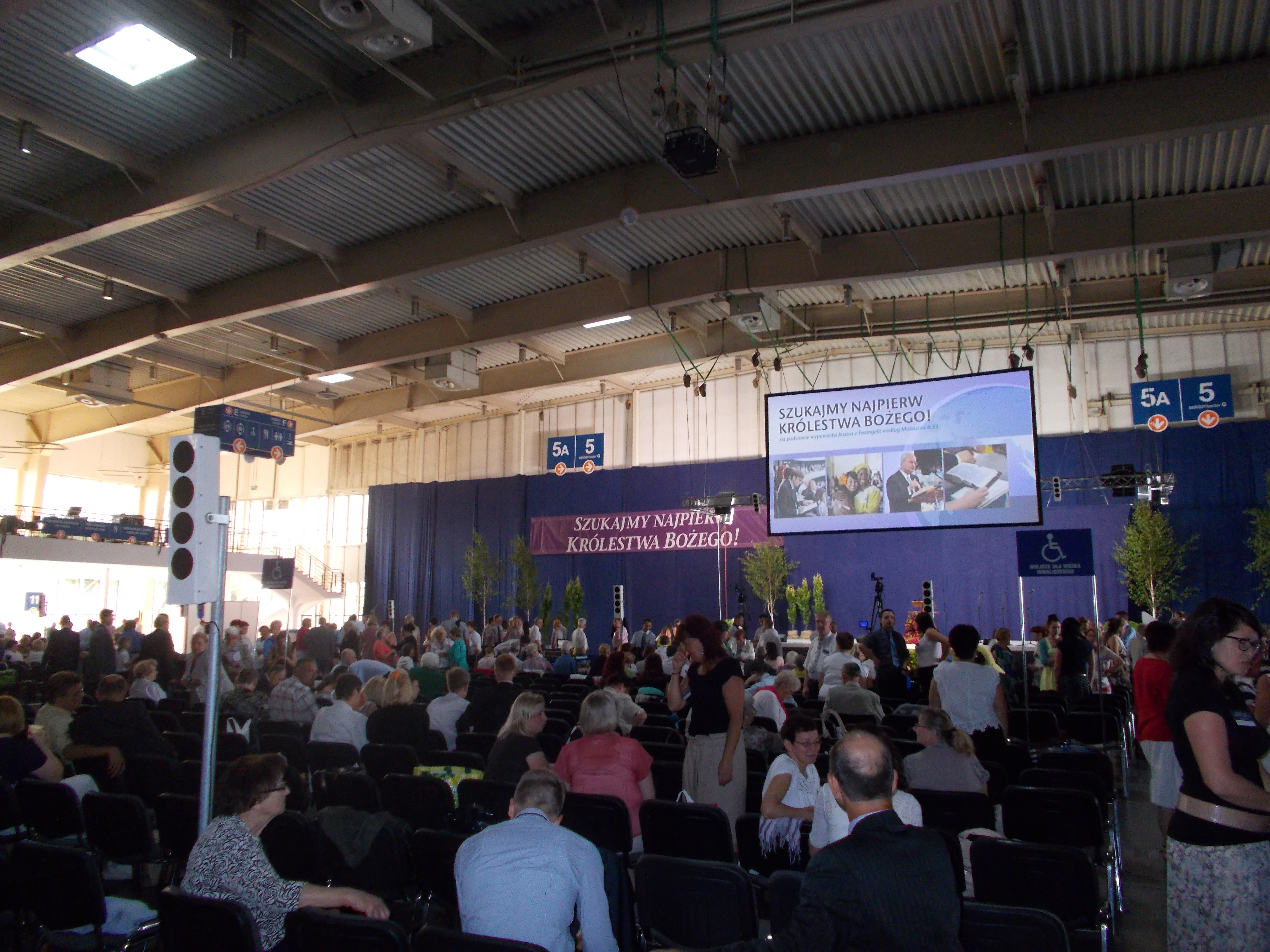 Kongres "Szukajmy najpierw Królestwa Bożego!" w Poznaniu. Teren Międzynarodowych Targów Poznańskich. Rok 2014.